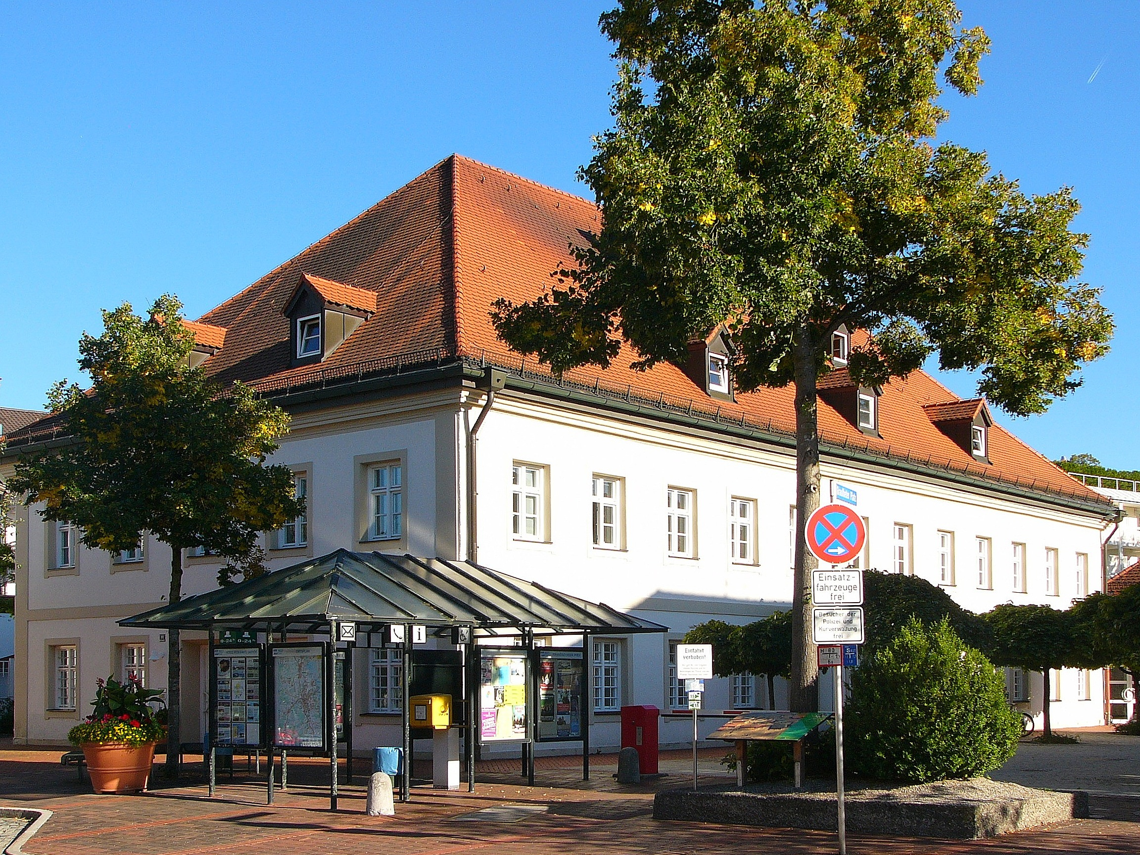 Ehem. Amtsgericht, zweigeschossiger langgestreckter Walmdachbau mit Putzgliederungen, 1772-74, 1818 Umbau.This is a photograph of an architectural monument.